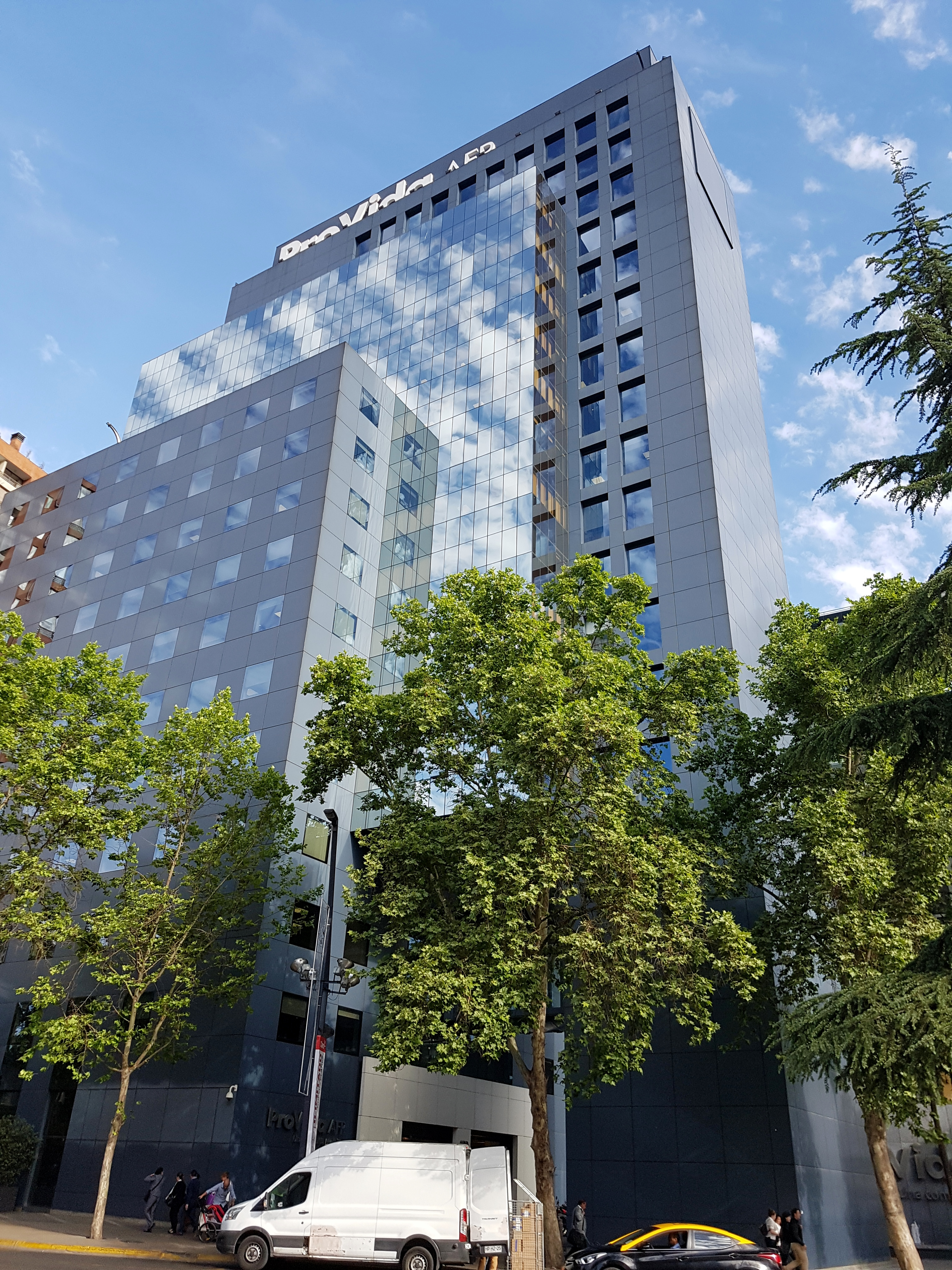 Edificio de la AFP Provida en la esquina suroriente de Nueva Providencia con Pedro de Valdivia, Santiago de Chile.